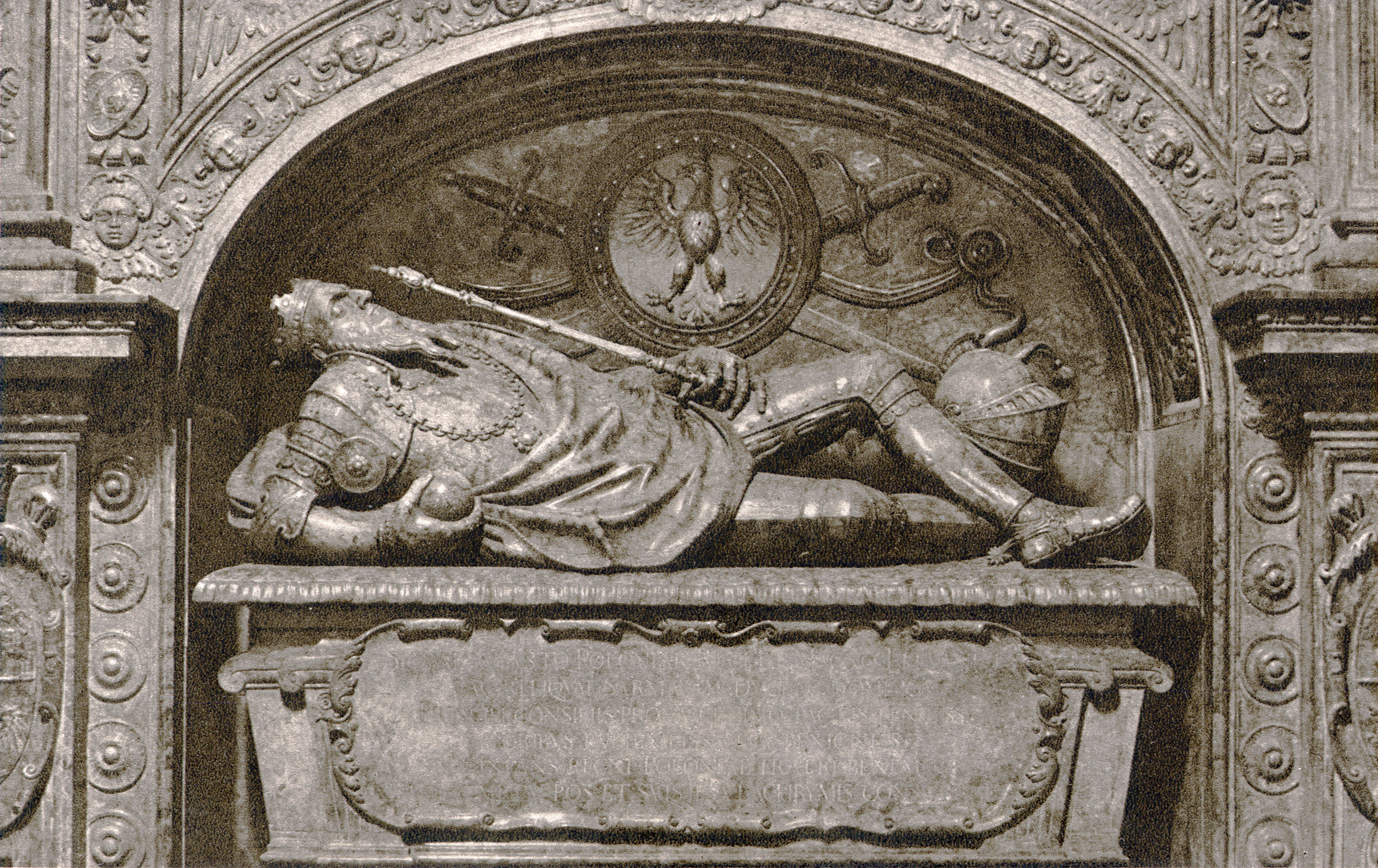 Nagrobek króla Zygmunta Augusta w Kaplicy Zygmuntowskiej